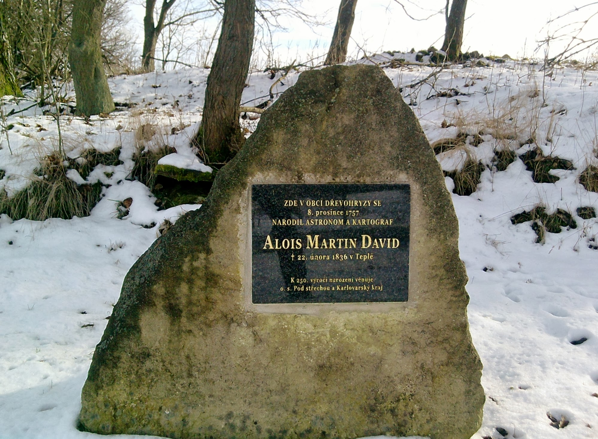 Památník Dřevohryzkého rodáka hvězdáře učence Davida